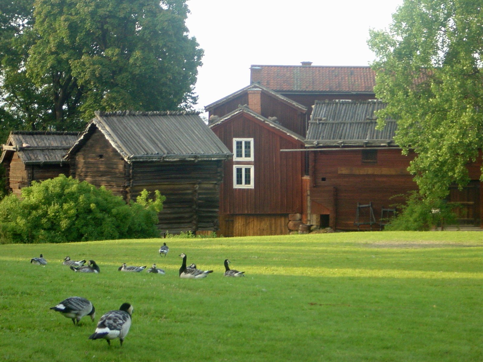 Summer view at "Delsbogården" in Skansen open air museum, Stockholm